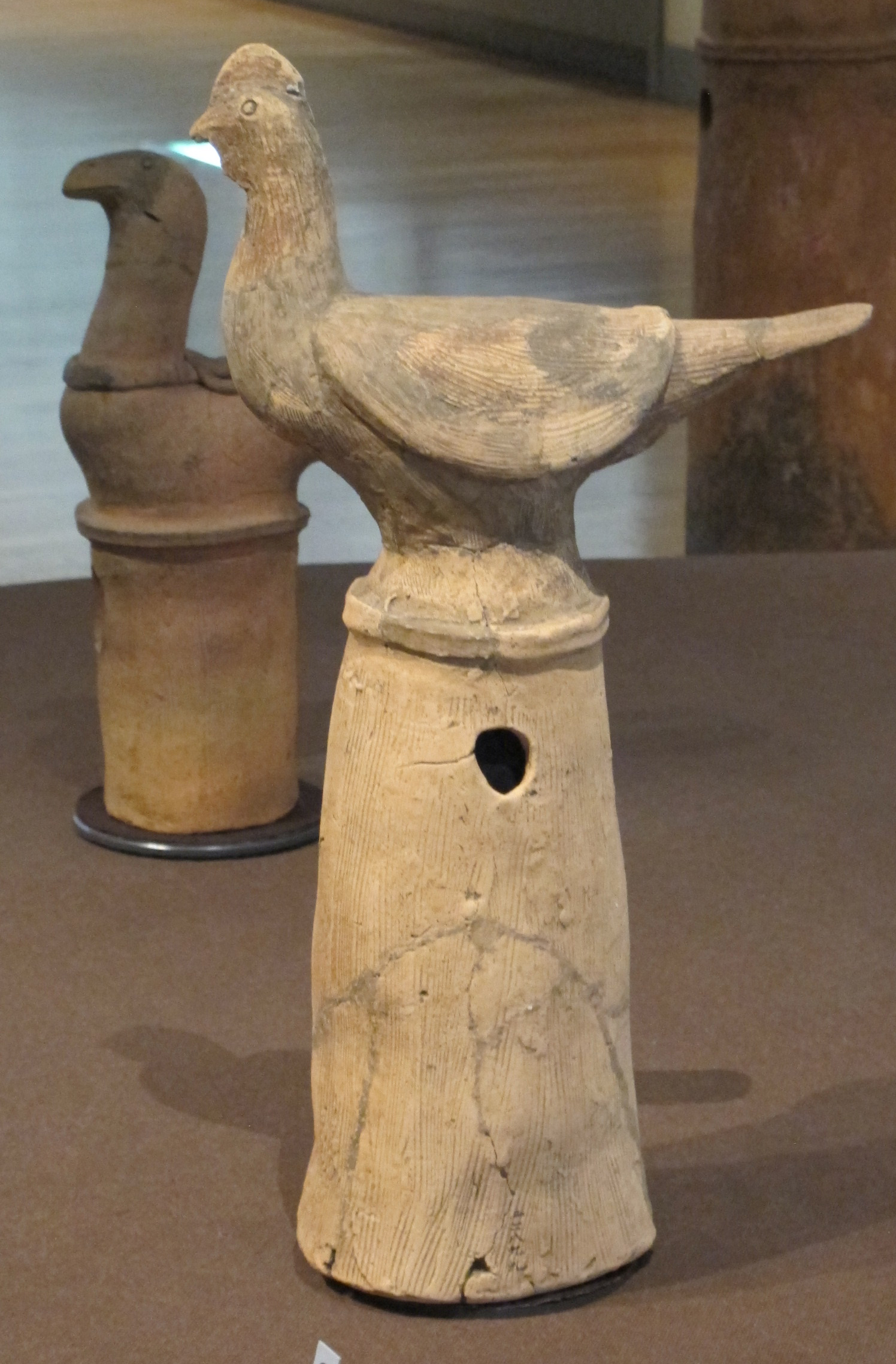 Periodo kofun, haniwa, pollo 2, VI sec